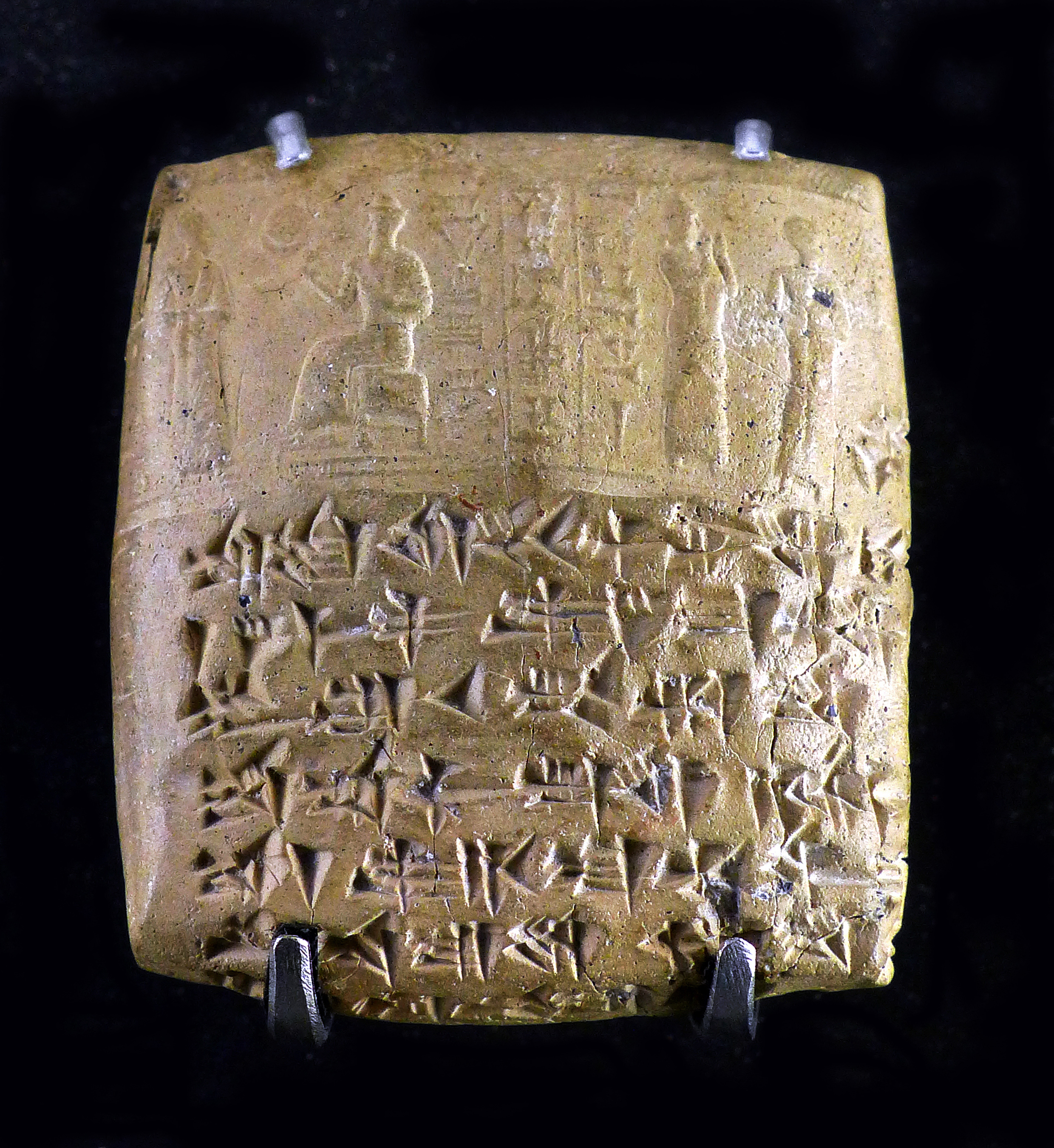 Ugaritic juridical text